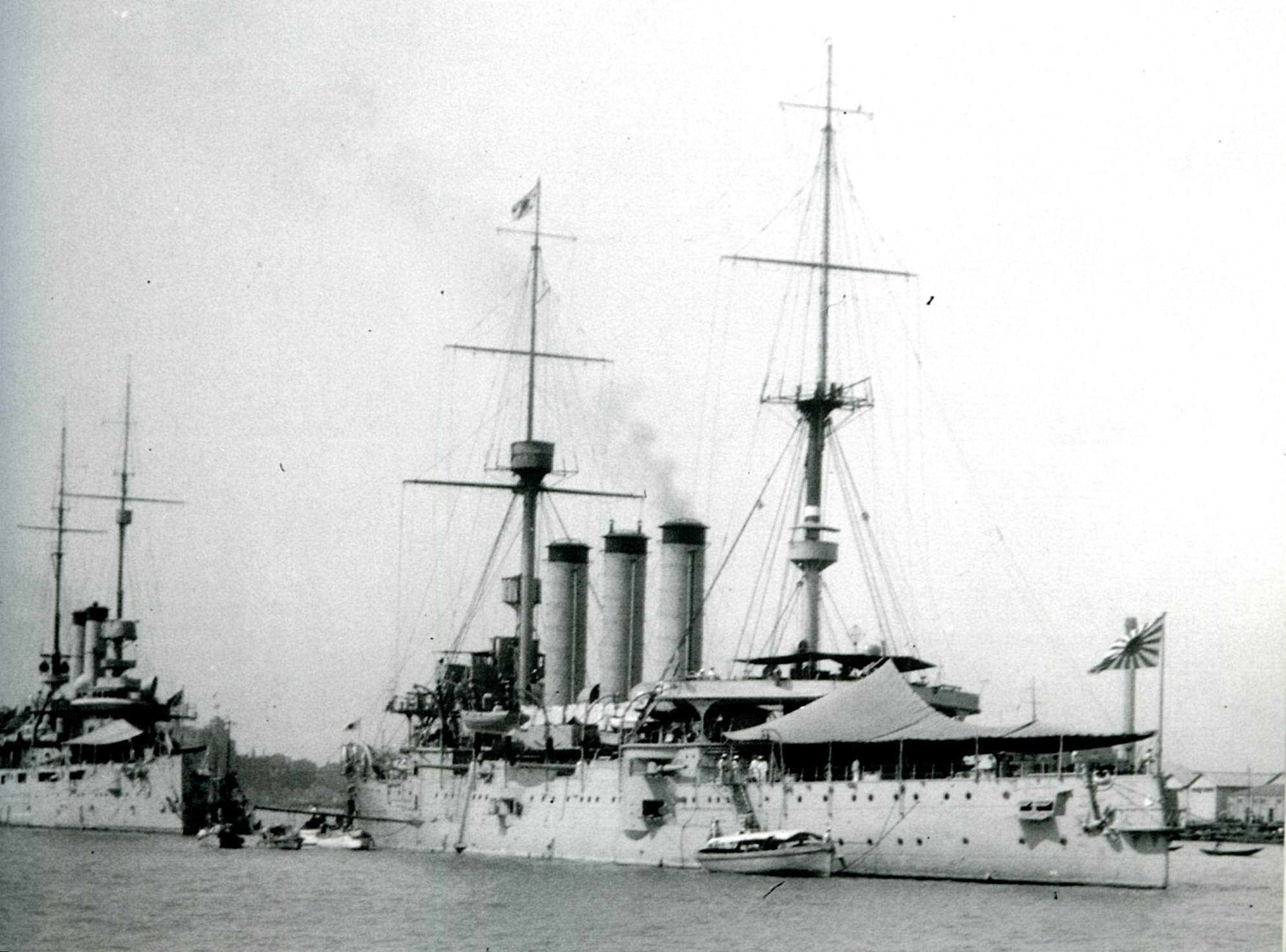 IJN Izumo at Shanghai